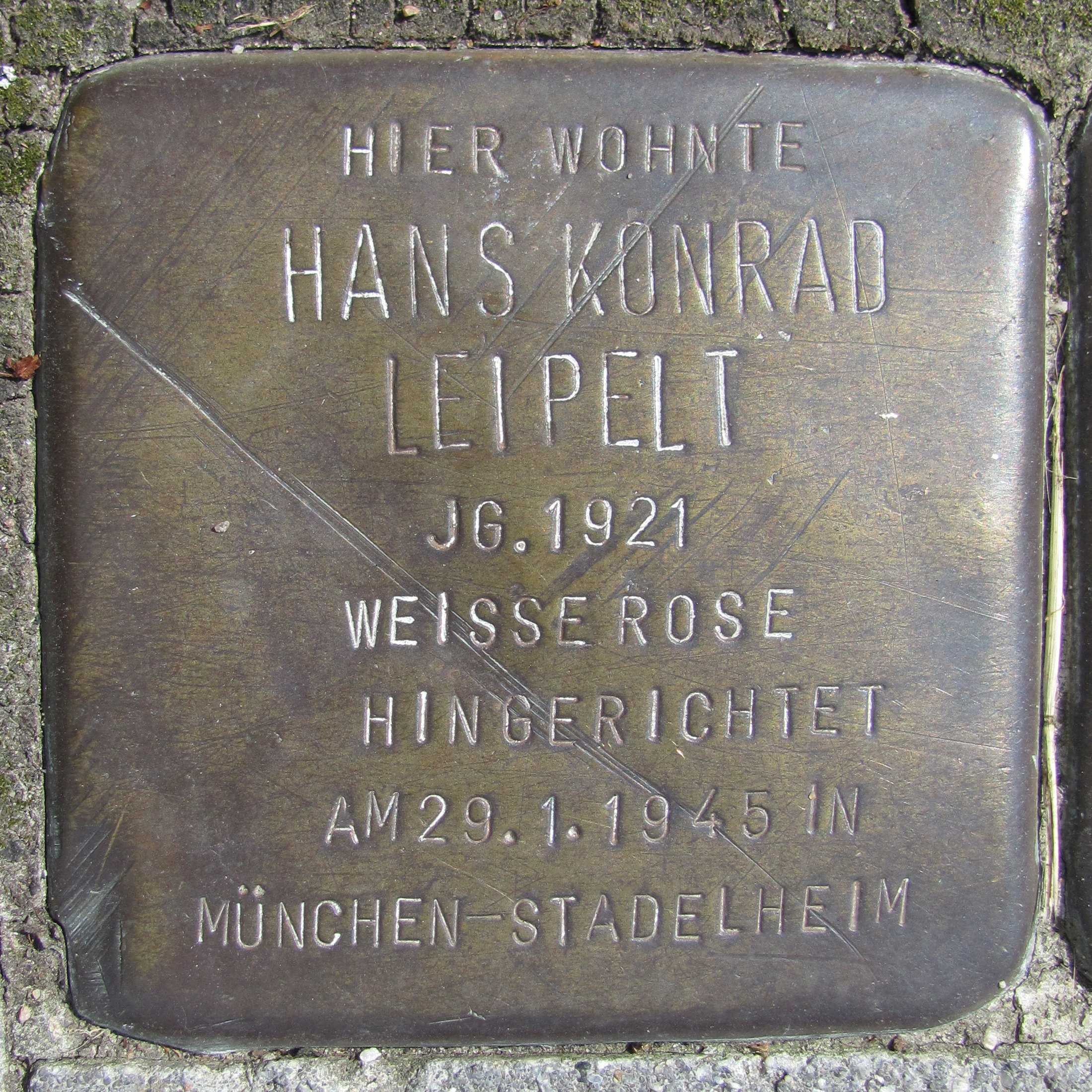 Stolperstein für Hans Konrad Leipelt vor dem Haus Mannesallee 20